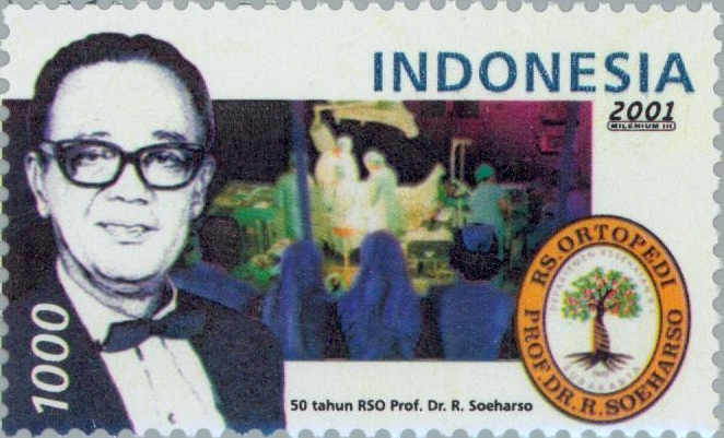 Suharso